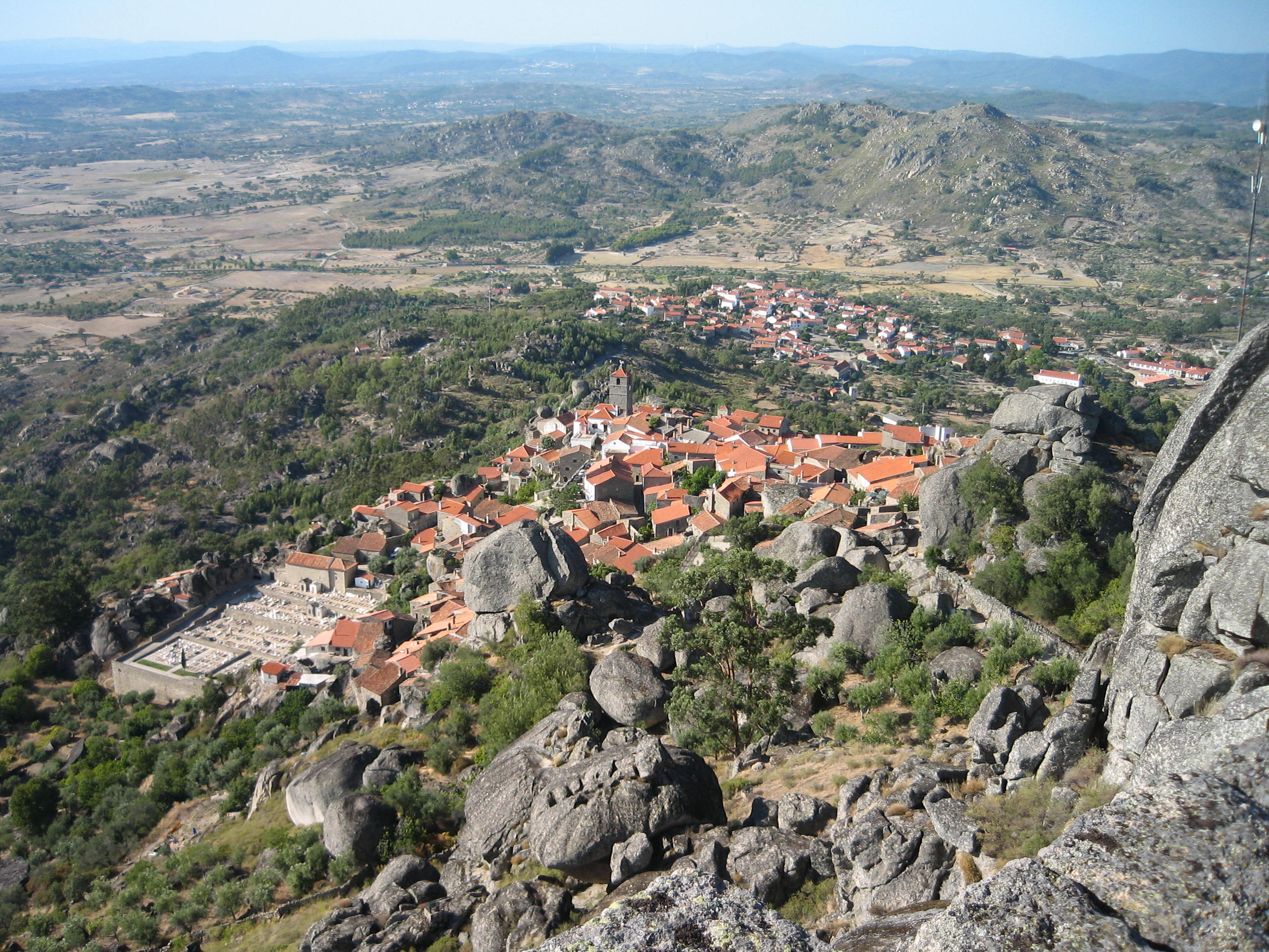 Vista da aldeia de Monsanto com as suas casas graníticas. Concelho de Idanha-a-Nova. This file was uploaded for Wiki Loves Monuments in Portugal with the unique identifier 74233.